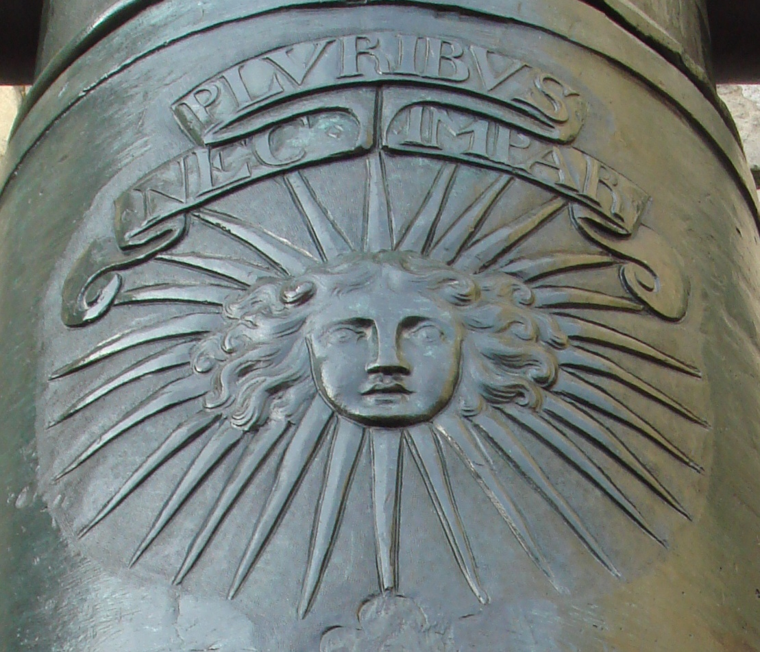 Nec_Pluribus_Impar on de Valliere gun